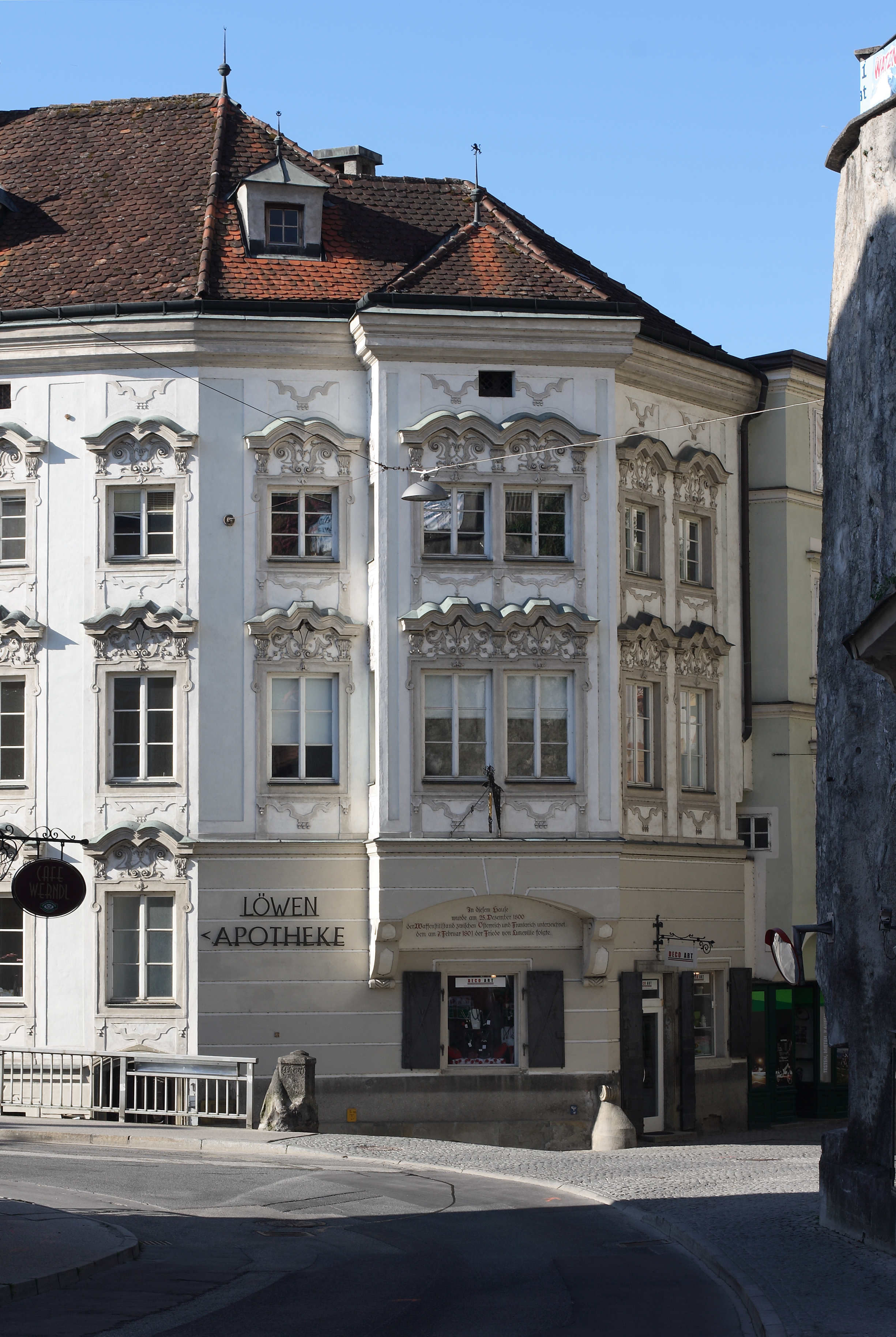 Die Fassade der Steyrer Löwenapotheke zum Platz Zwischenbrücken